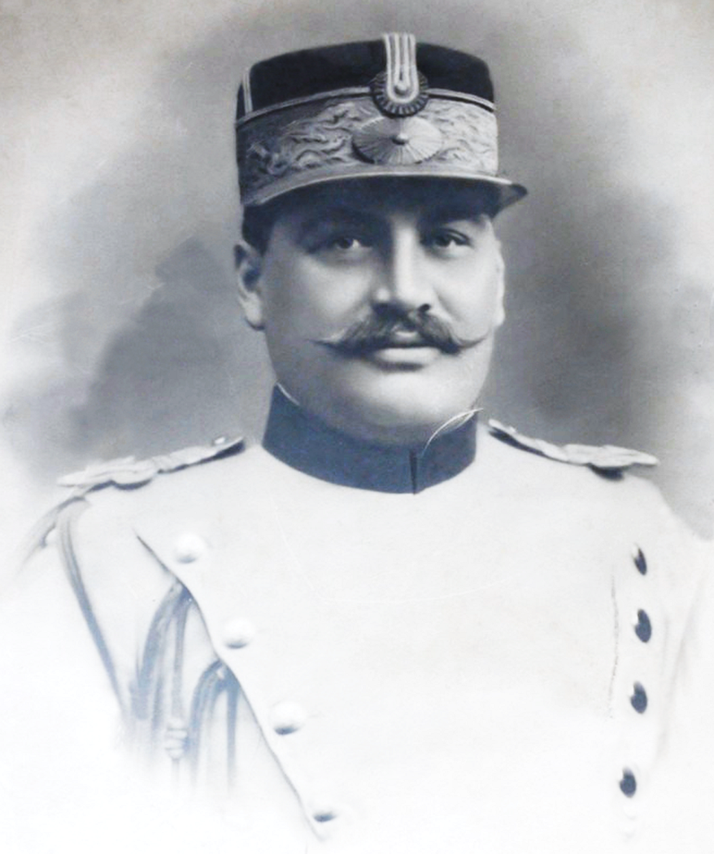 First War I Rumanian General Stan Poetaș 1915